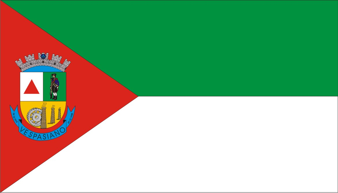 Bandeira da cidade de Vespasiano-MG